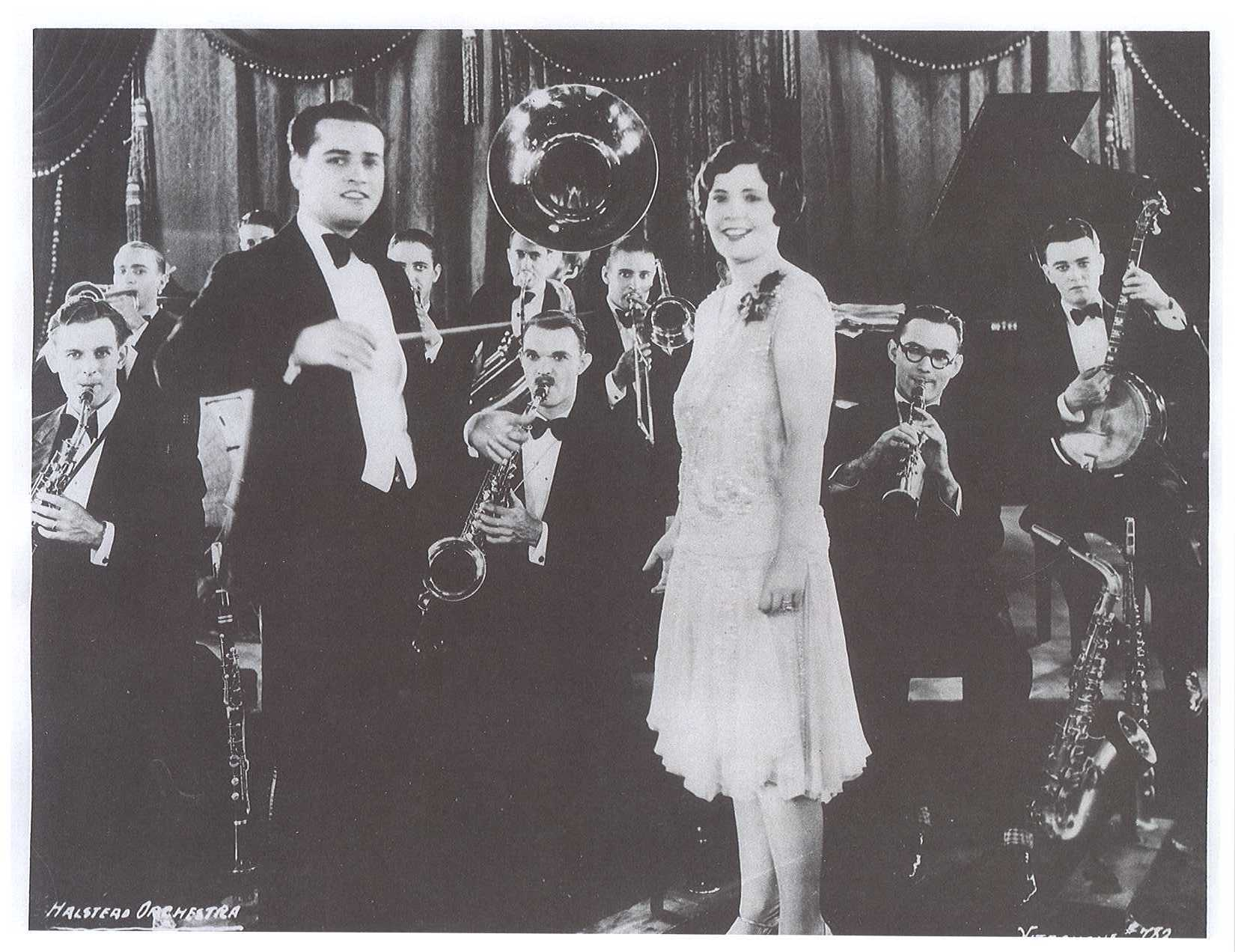 Henry Halstead Orchestra